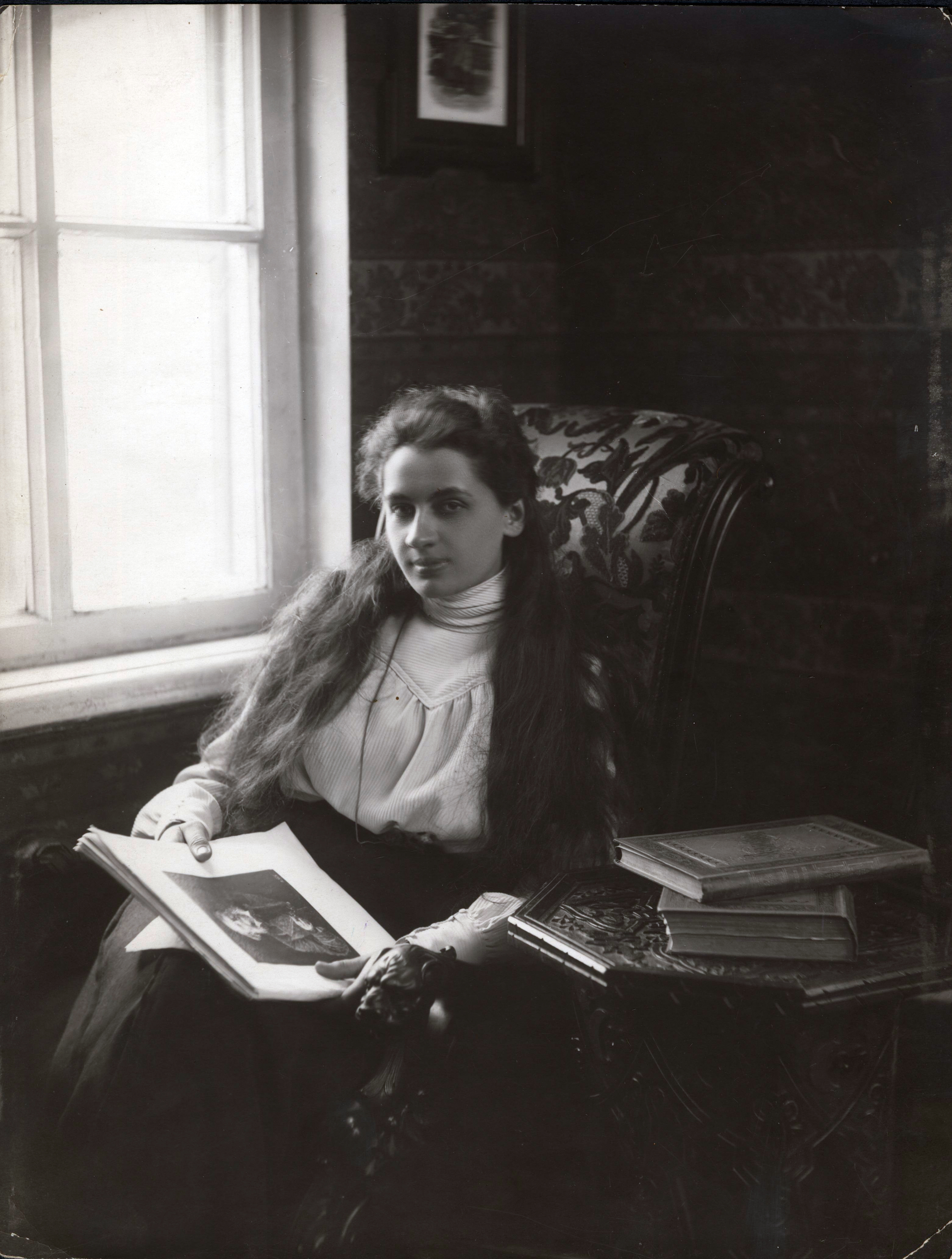 Е. П. Пешкова, жена А. М. Горького г. Нижний Новгород. 1901 г.